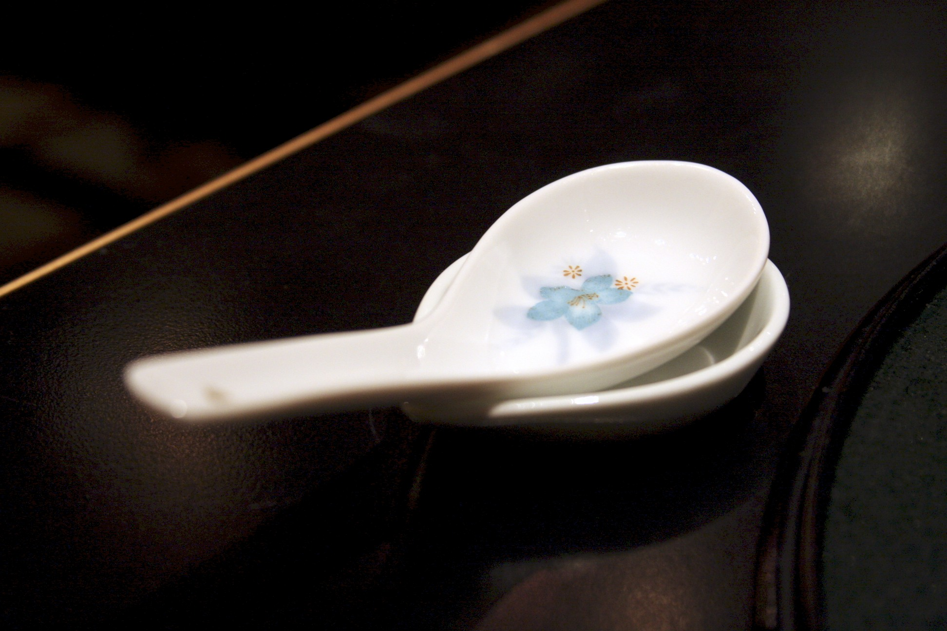 お好み懐石 Okonomi Kaiseki